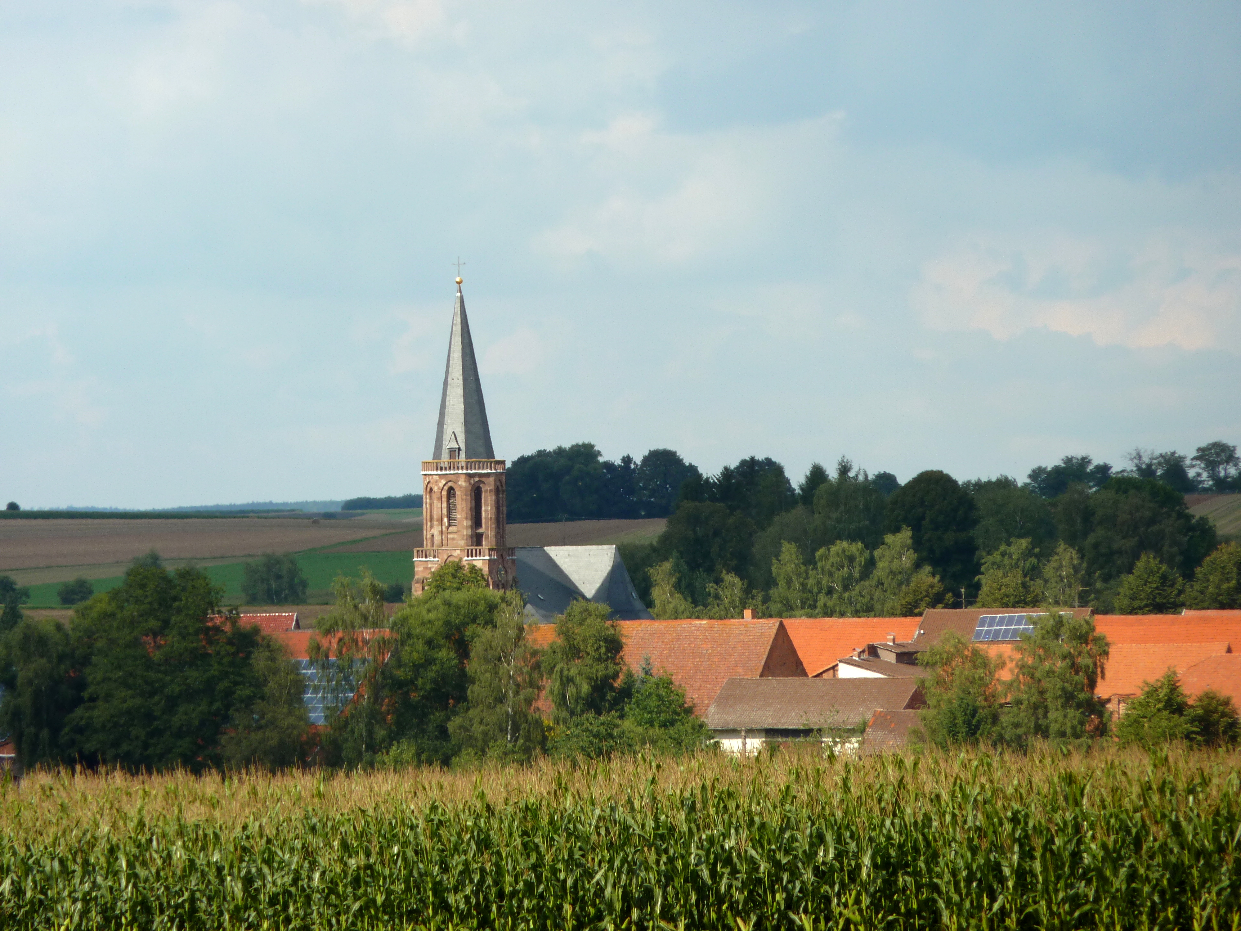 Blick auf Bernshausen, Eichsfeld, Landkreis Göttingen